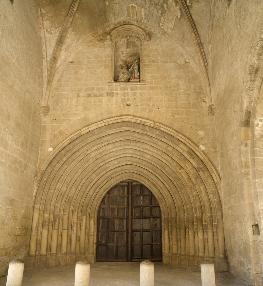 Cultural Heritage Spain RI-51-0000702